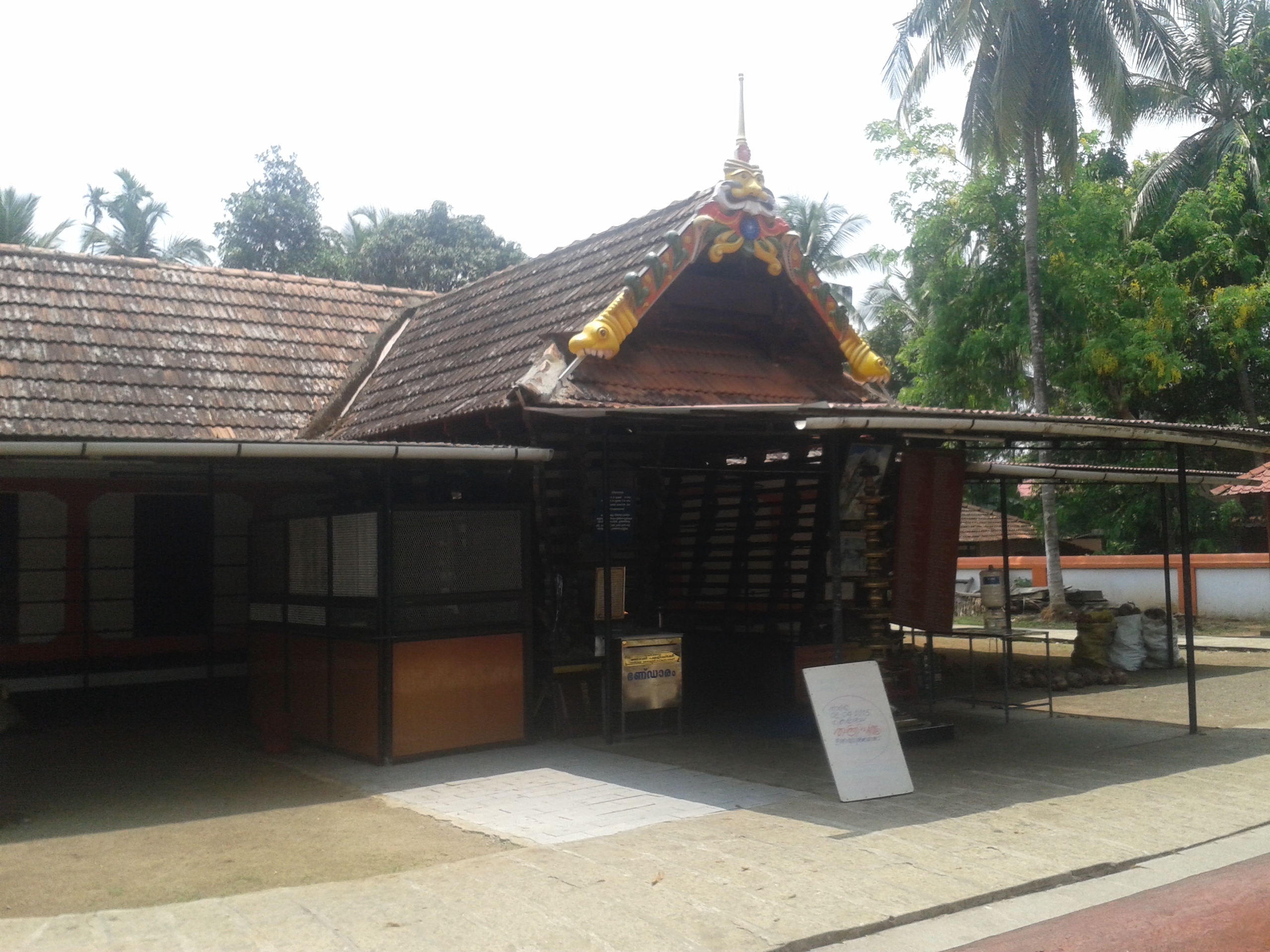 പൂവണി ശിവക്ഷേത്രം, കോലഴി, തൃശൂര്‍ ജില്ല